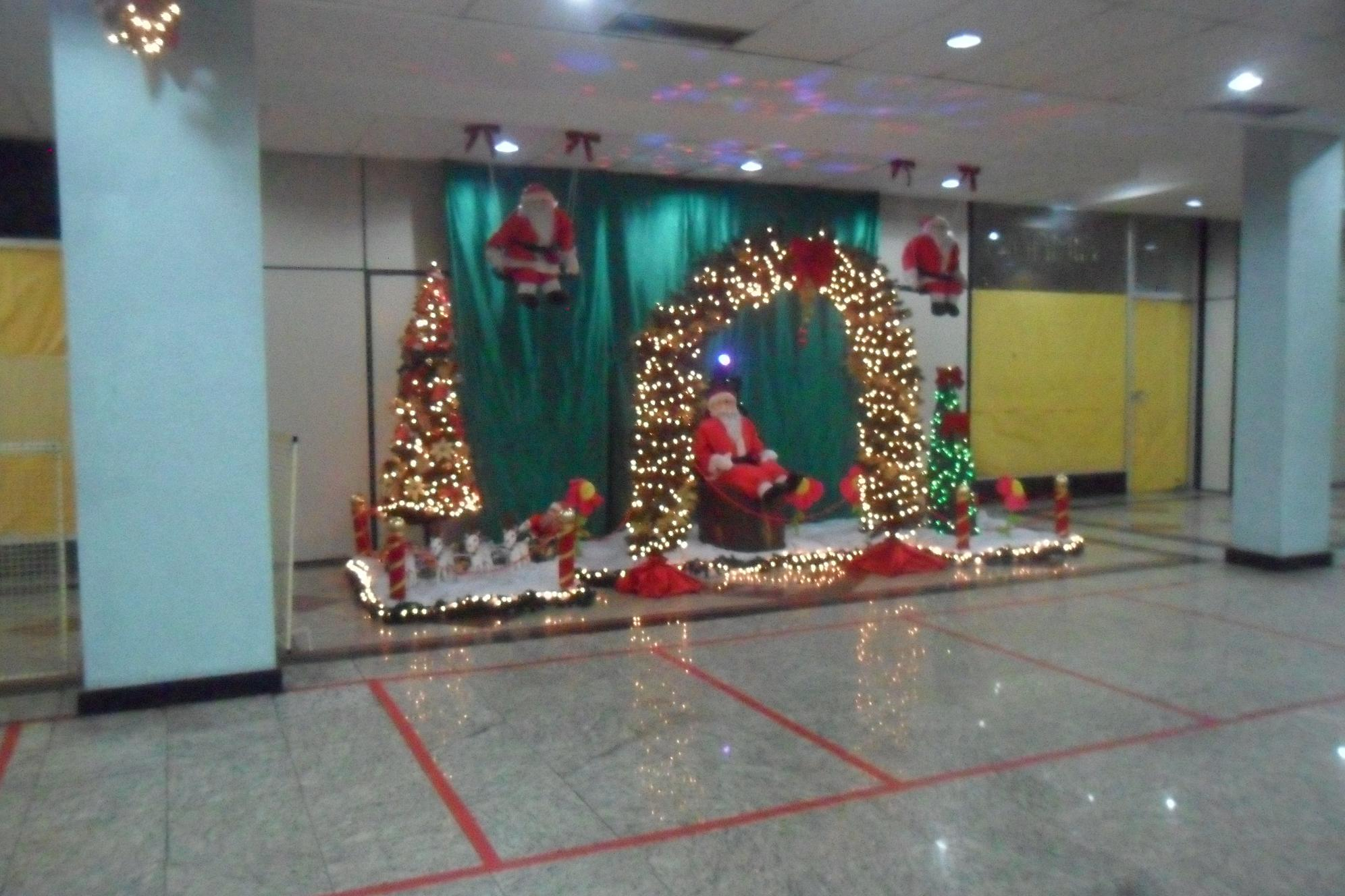 Decoração natalina do Shopping do Meier.